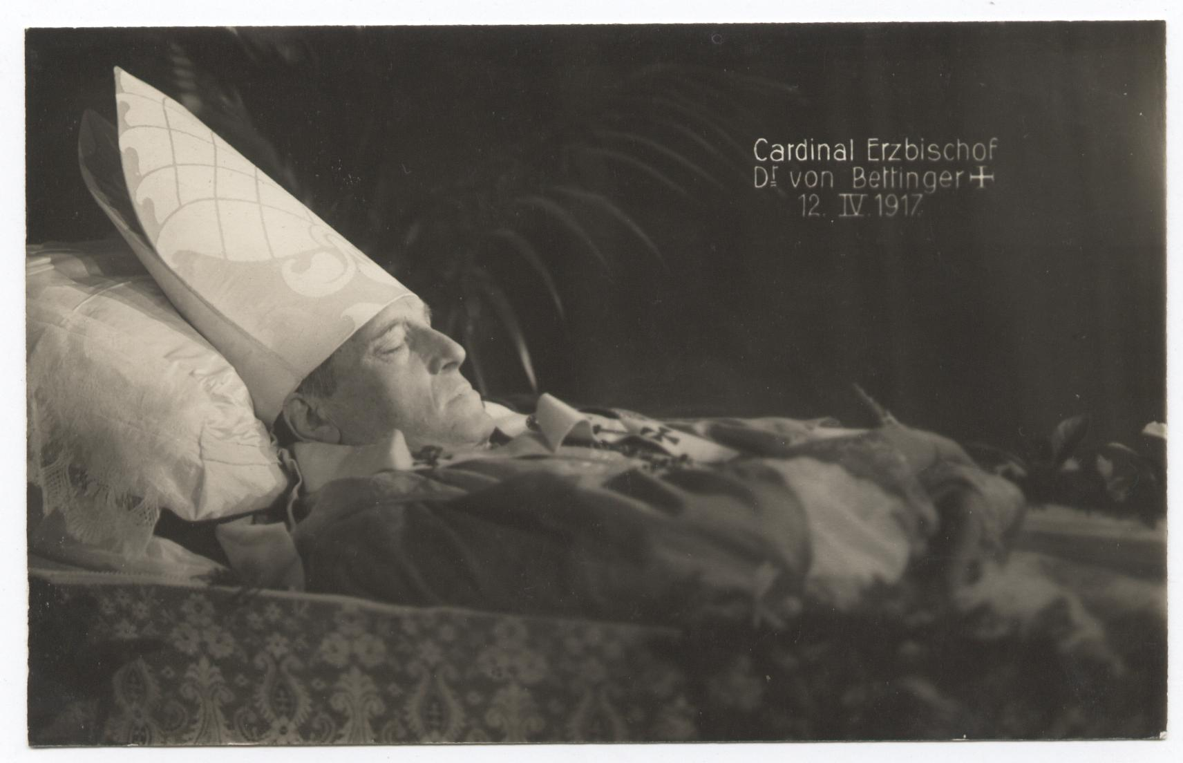 Kardinal Franz Bettinger, München, auf dem Sterbebett 1917